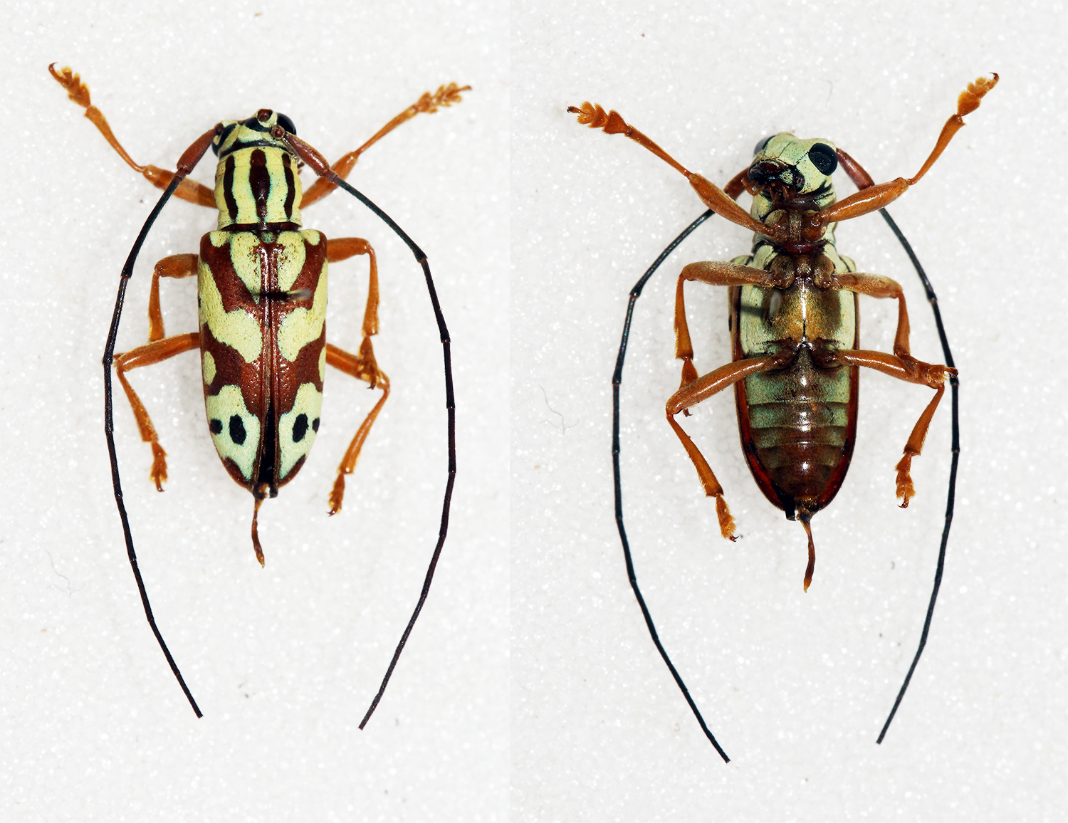 Dalman,1817 Sex: Male Data: 09-2013 - Ebogo - Cameroon Size: 9mm